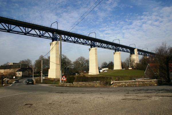 Viadukt vu Moresnet vu Süden gesinn.